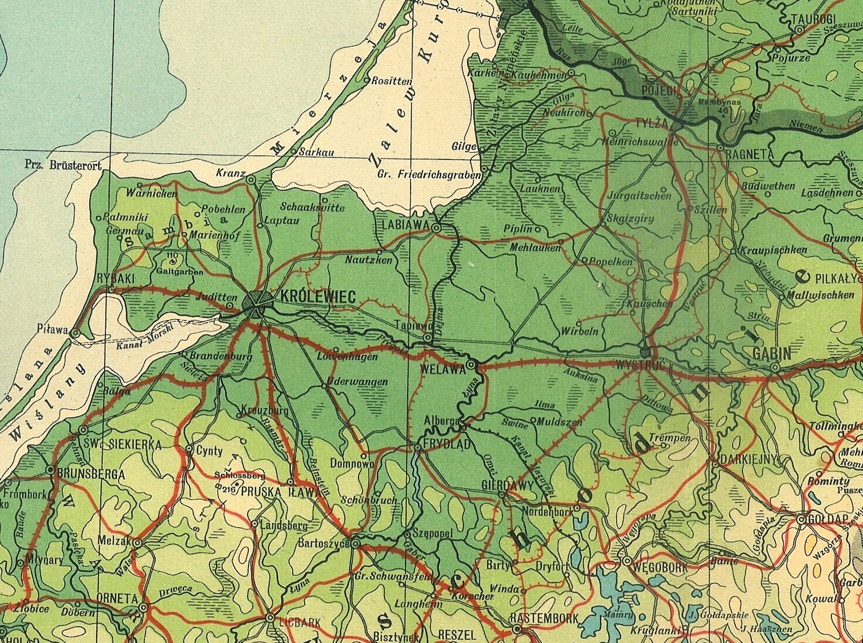 Mapa Prus Dolnych (Niederland) z ok. 1920 roku z polskimi odpowiednikami nazw.